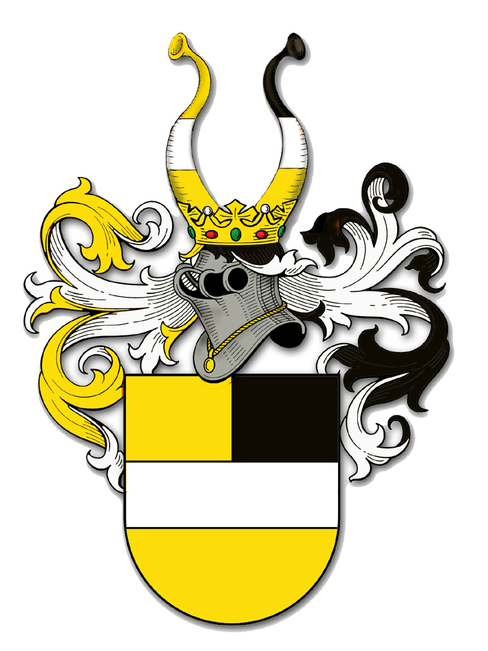 Brasão dos senhores de Girlan-Griensberg-Altenburg-Tramin do Trentino.